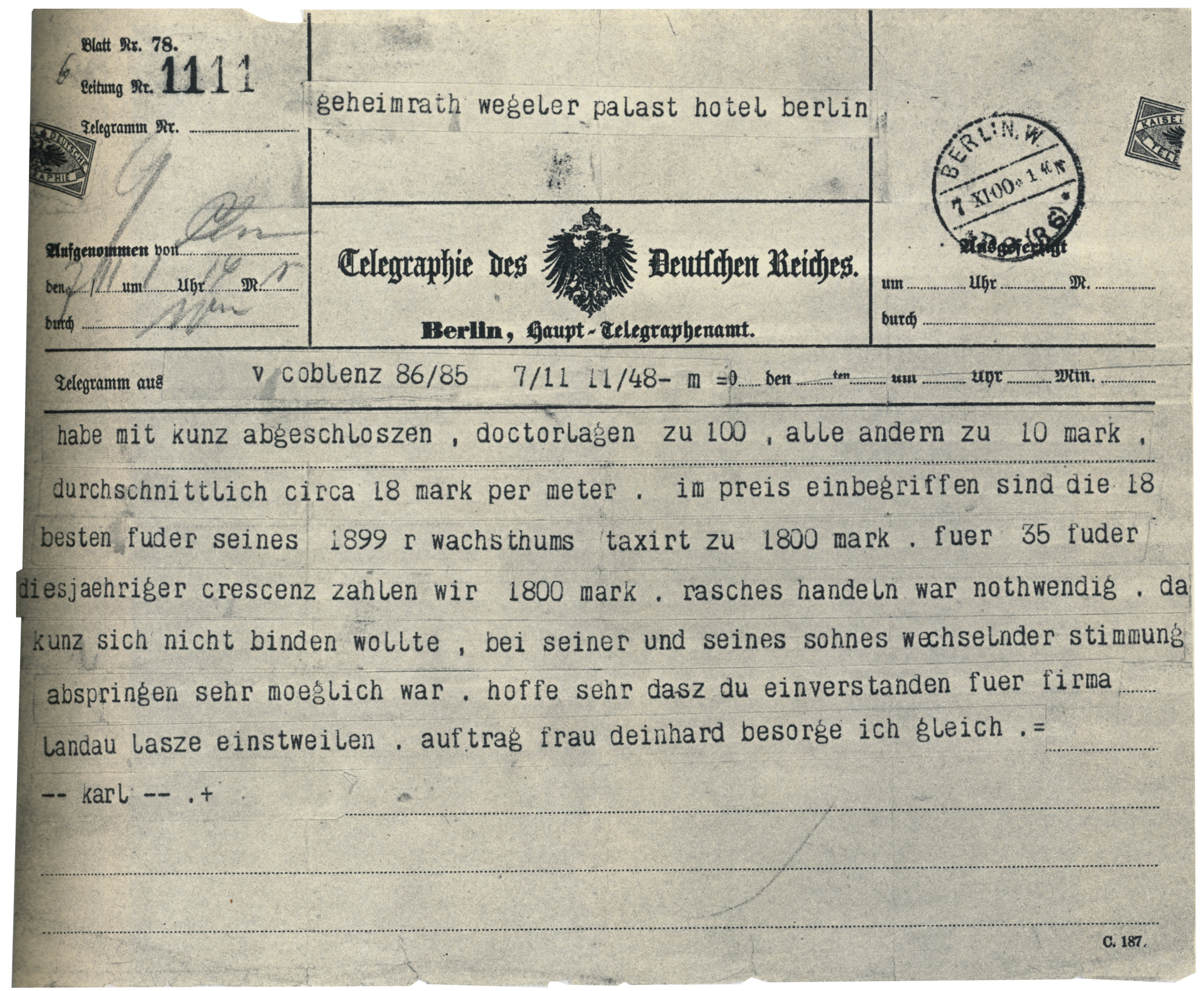 Telegramm an Julius Wegeler vom 7. November 1900, in dem sein Bruder Karl ihm mitteilt, den Kauf eines Teils des Bernkasteler Doctor abgeschlossen zu haben.